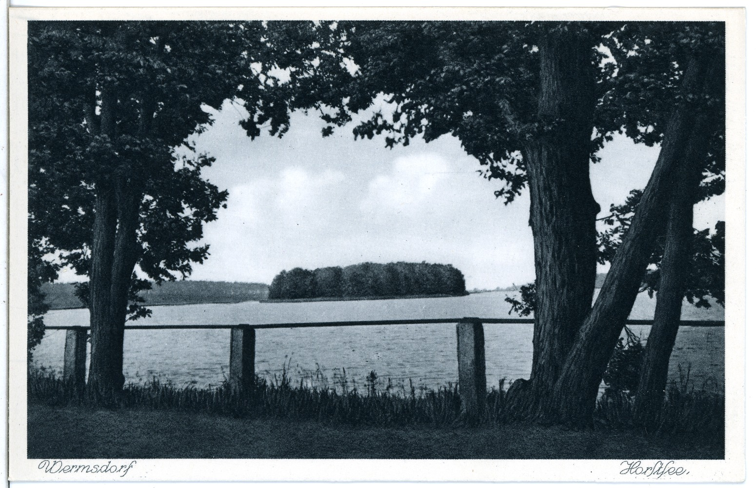 Wermsdorf; Horstsee This postcard is from publisher Brück & Sohn in Meißen ( postcard has a unique number 23676 and is available in a higher resolution at the publisher. This images was uploaded in a cooperation project between Wikipedians and the publisher.